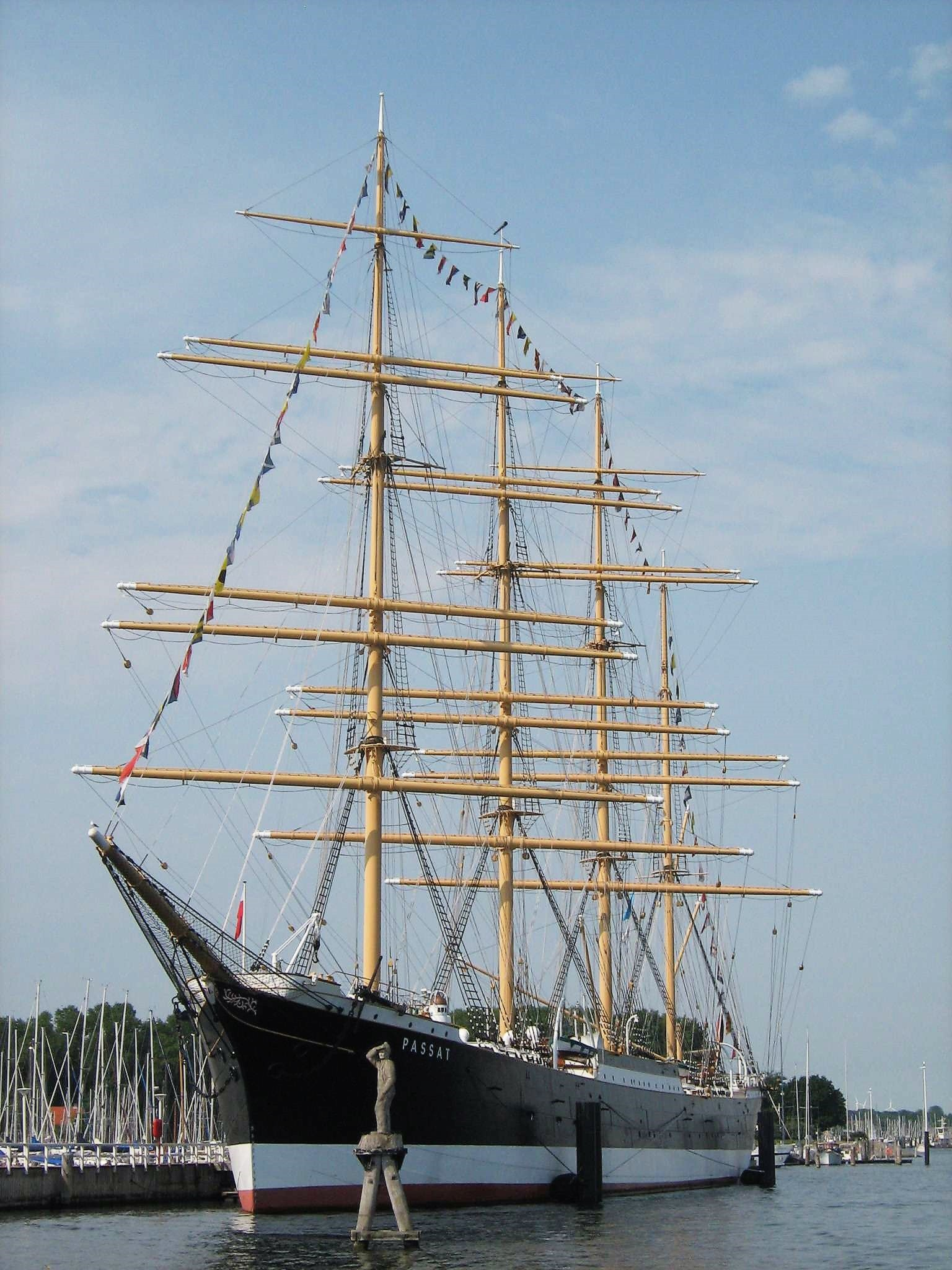 Viermastbark Passat, Travemünde, Deutschland